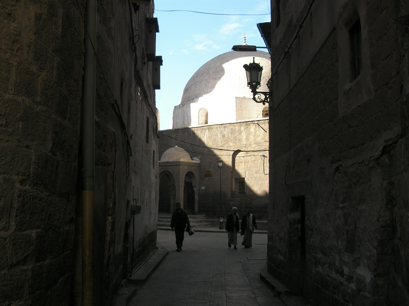 사나 모스크의 모습